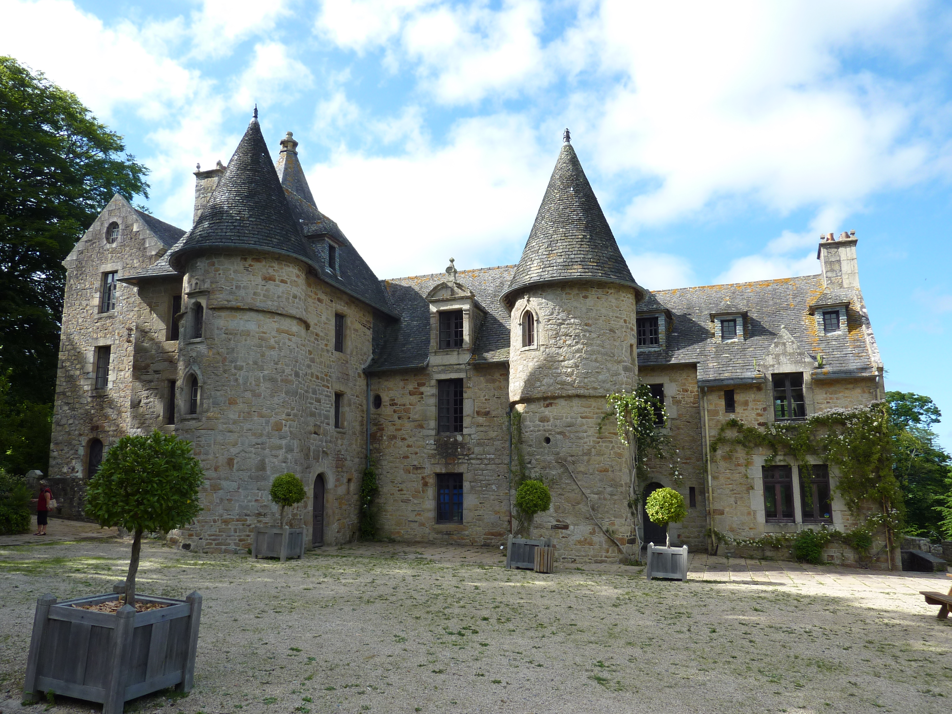 Ploujean Château de Suscinio (maison Cornic)façade sud